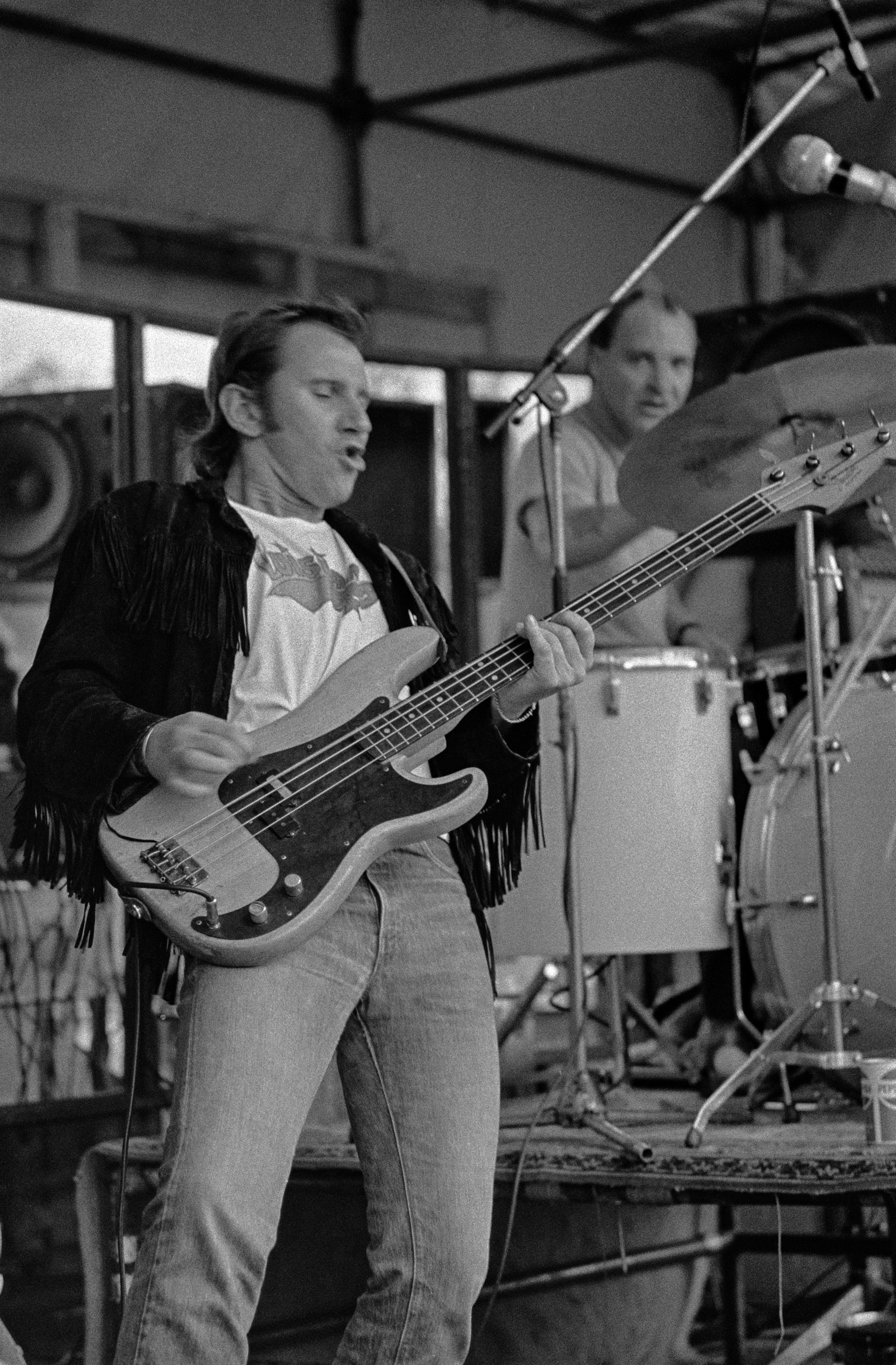 Hurriganes esiintyy Kaivopuistossa. Cisse Häkkinen (basso, laulu), Remu Aaltonen (laulu, rummut).